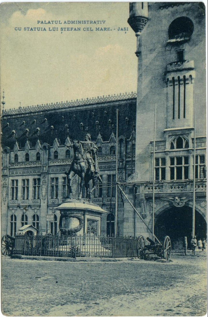 Statuia lui Ştefan cel Mare din Iaşi